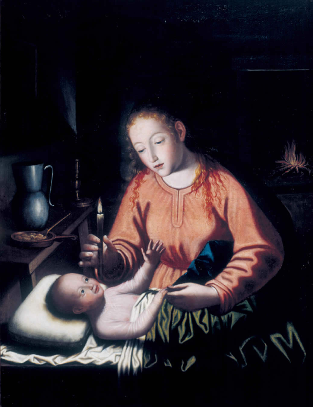 La obra representa a la Virgen María despertando a su hijo, el Niño Jesús.